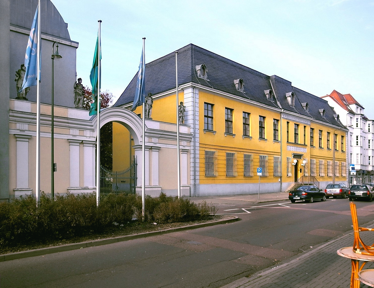 Dessau, Palais Dietrich, Wissenschaftliche Bibliothek